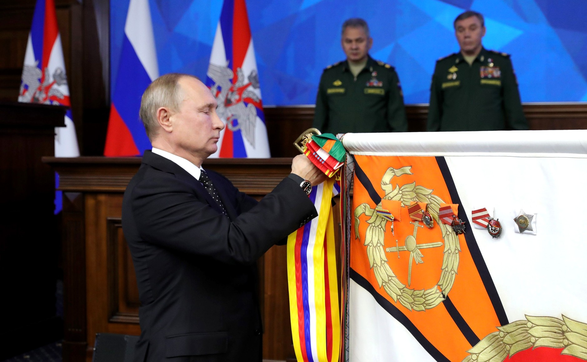 Церемония вручения государственных наград военным подразделениям. Орденом Жукова награждается Общевойсковая академия Вооружённых Сил Российской Федерации